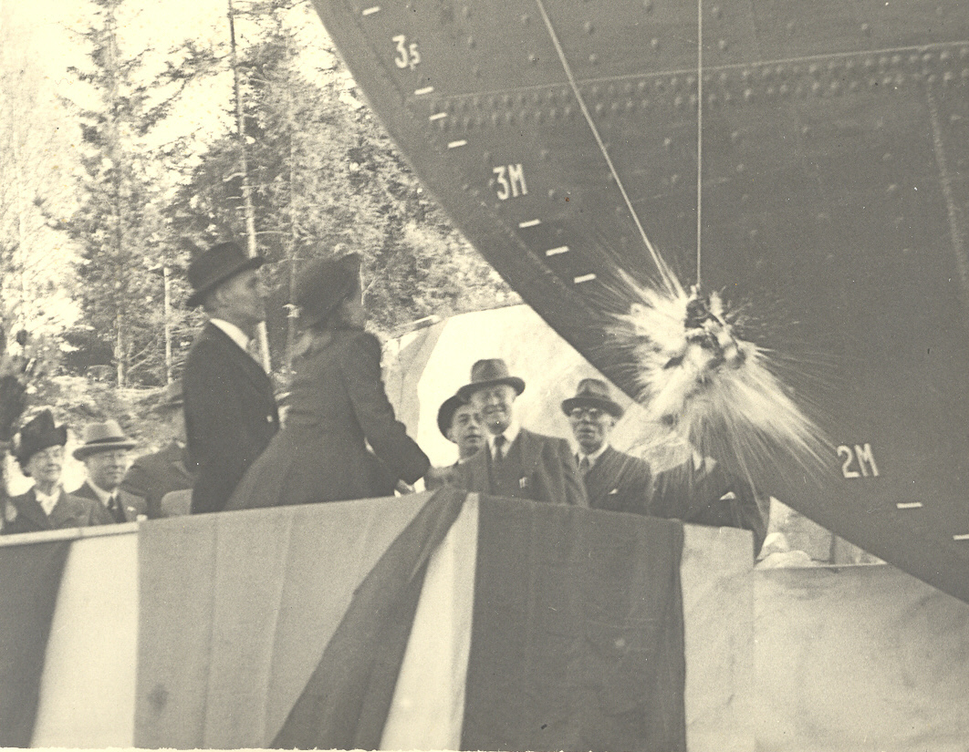 Trajan is baptized, 1947.